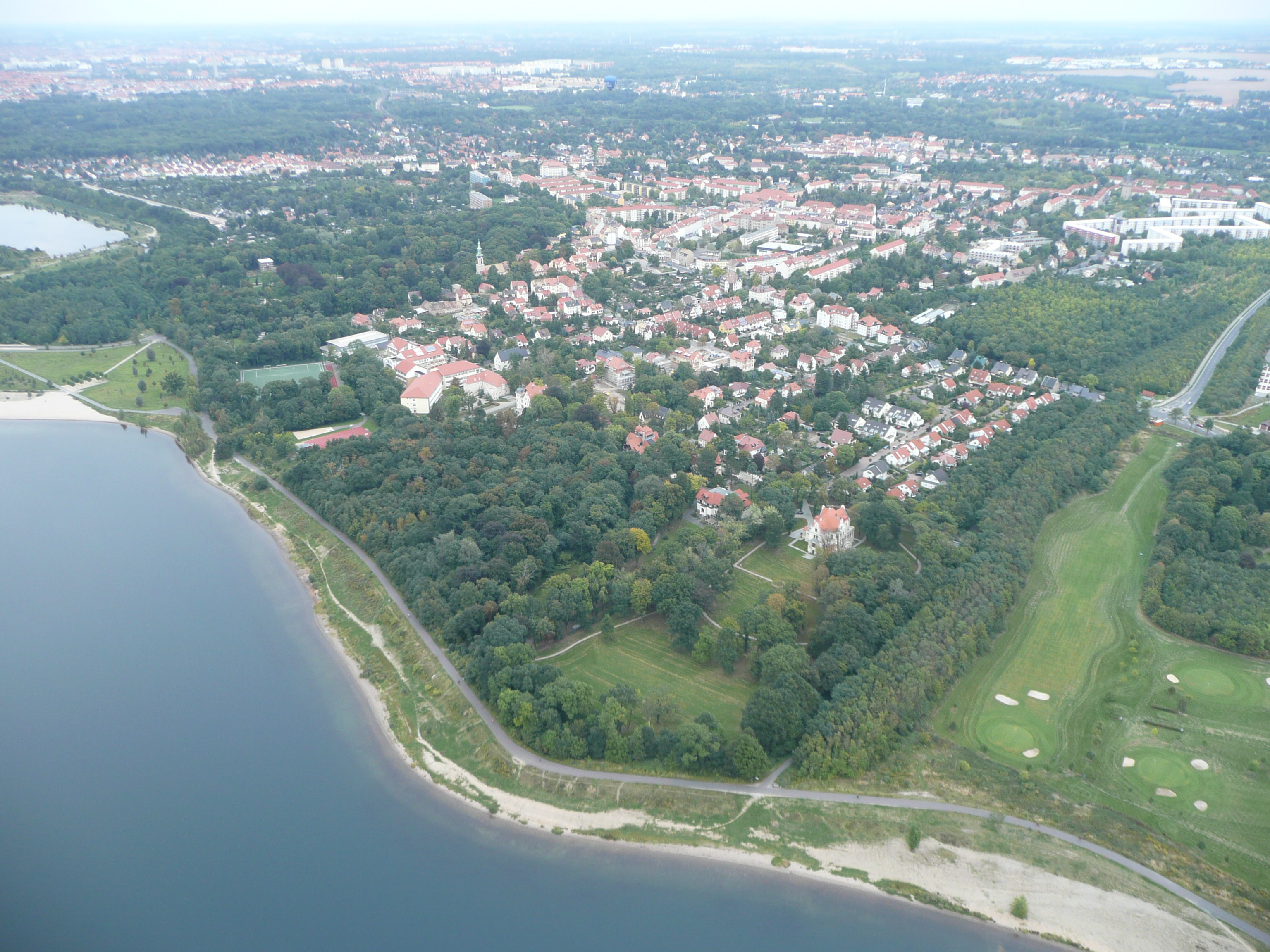 Blick auf Gautzsch, Ortsteil von Markleeberg, aus der Luft - im Vordergrund der Cospudener See